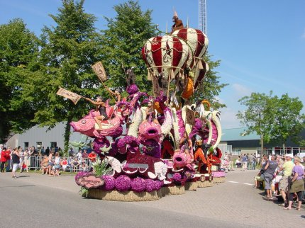 Wagen van Stark Wark